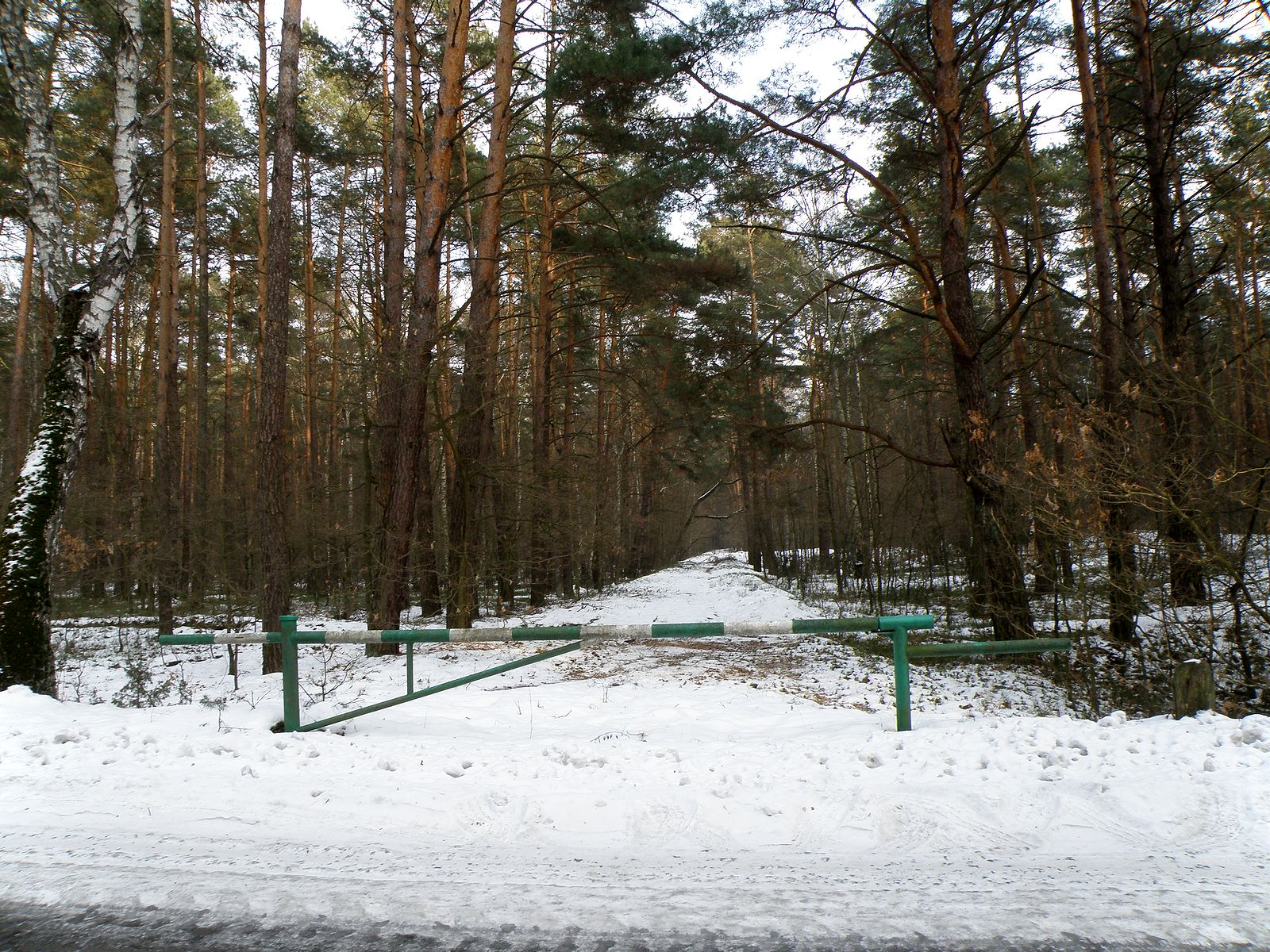 Palmiry, pozostałości po składnicy amunicji w KPN